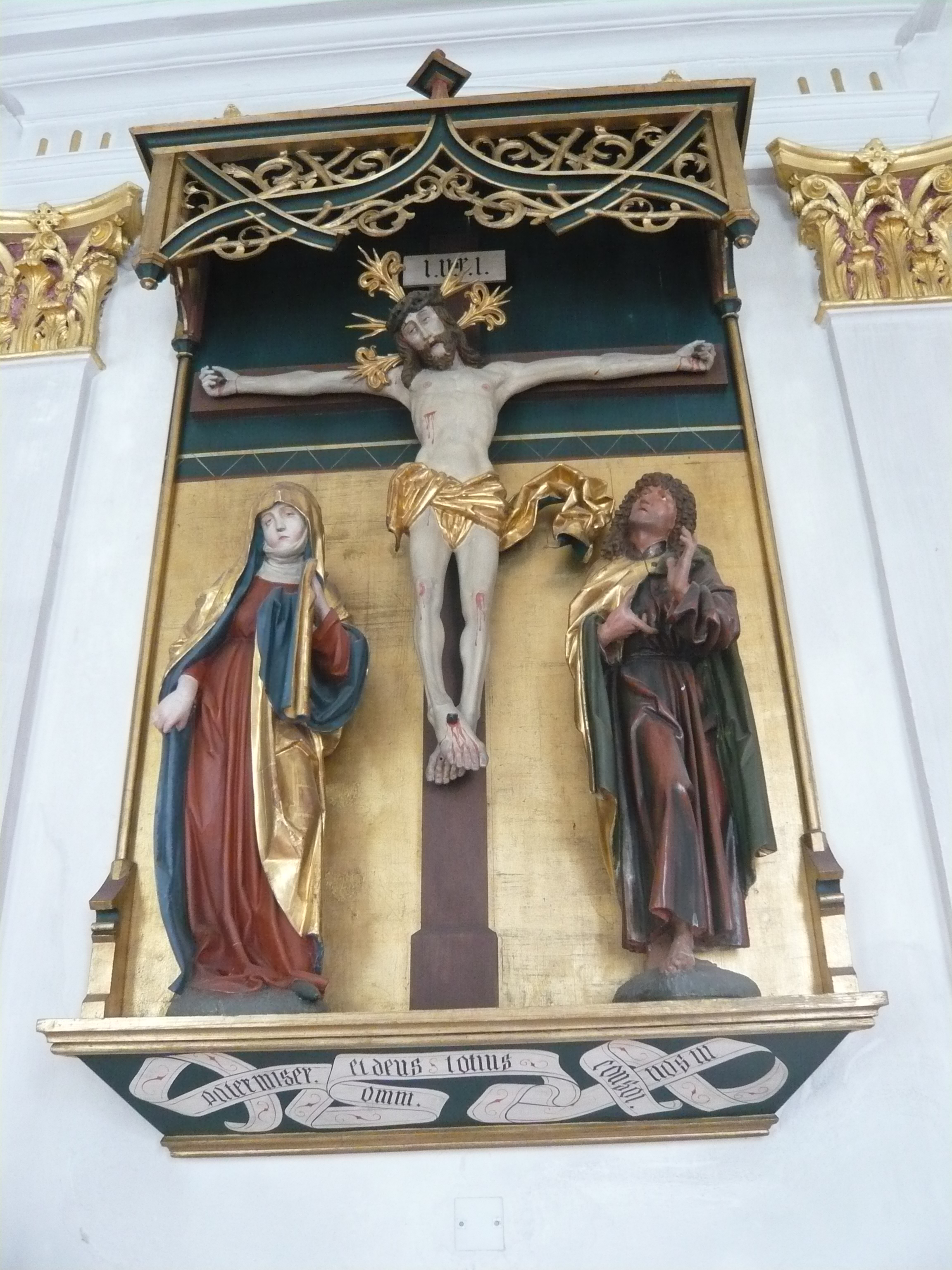 St. Martinskapelle in Kappel, Gemeinde Pfronten, Ostallgäu